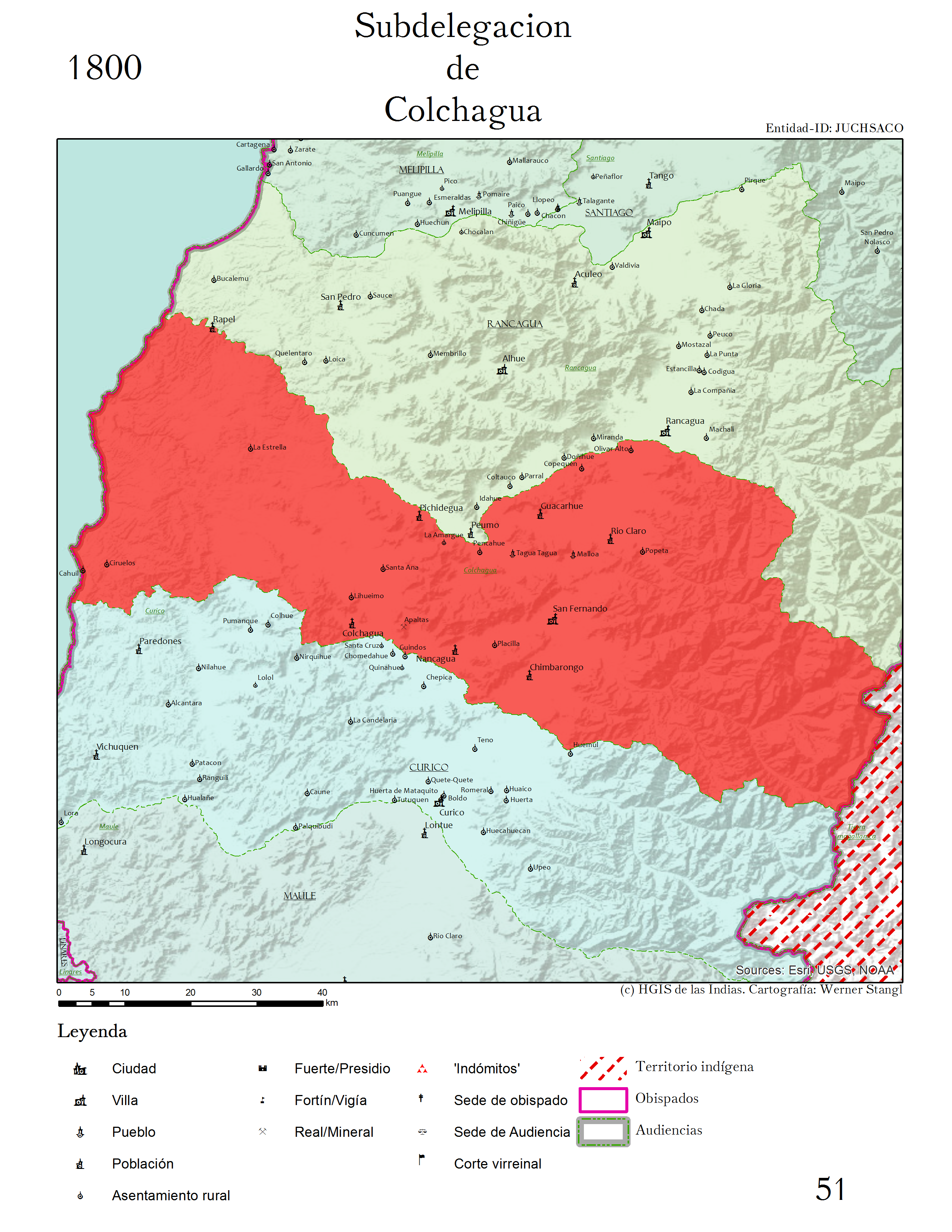 El Partido de Colchagua en 1800